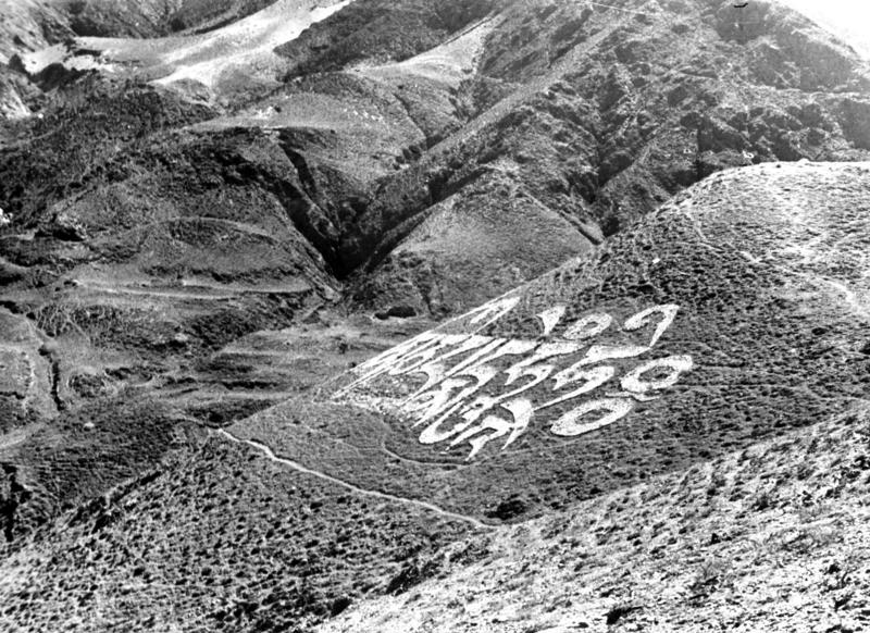 Tsetang